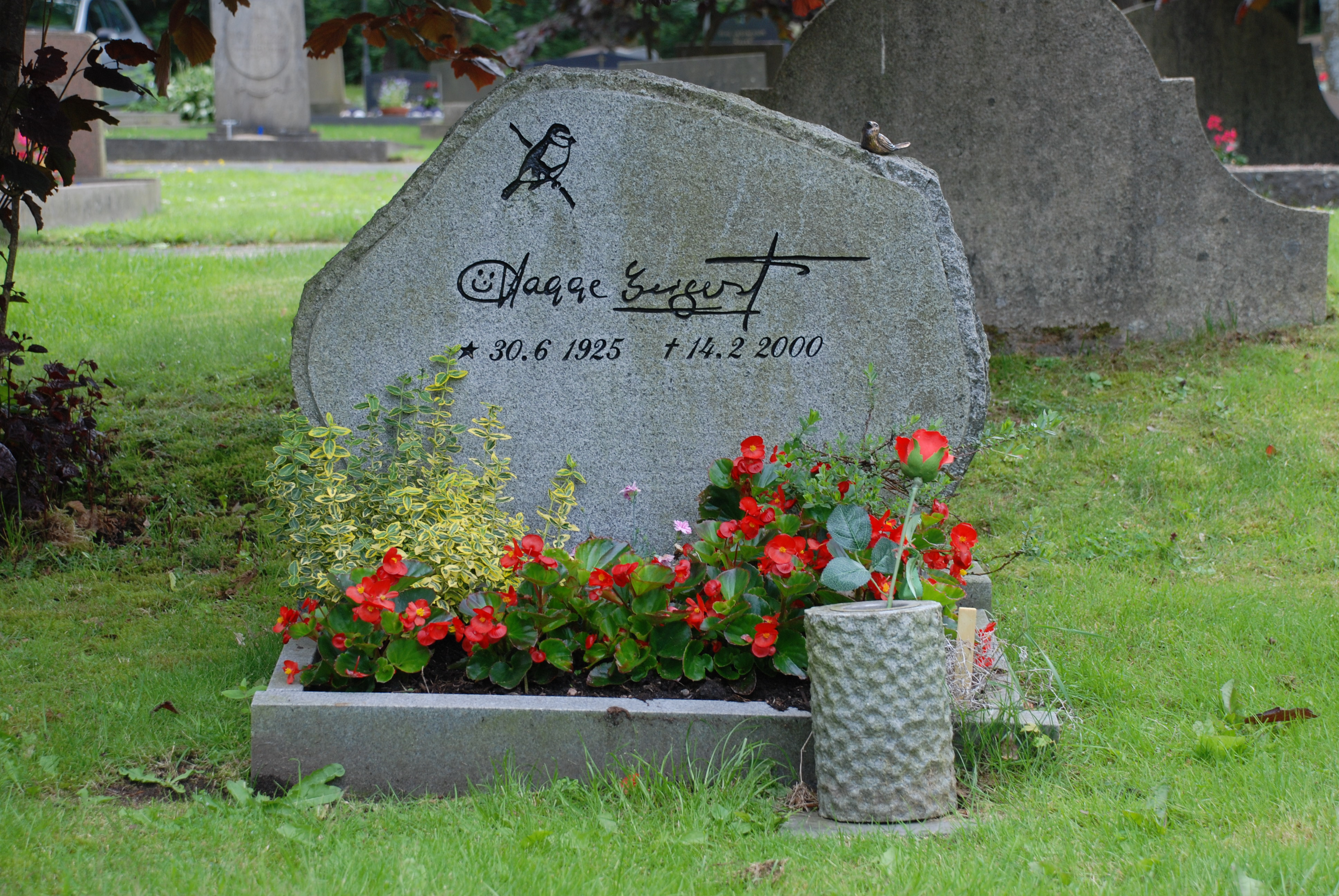 Revyförfattaren mm Hagge Geigerts grav på Västra kyrkogården i Göteborg. Grav nr K017, G00173.